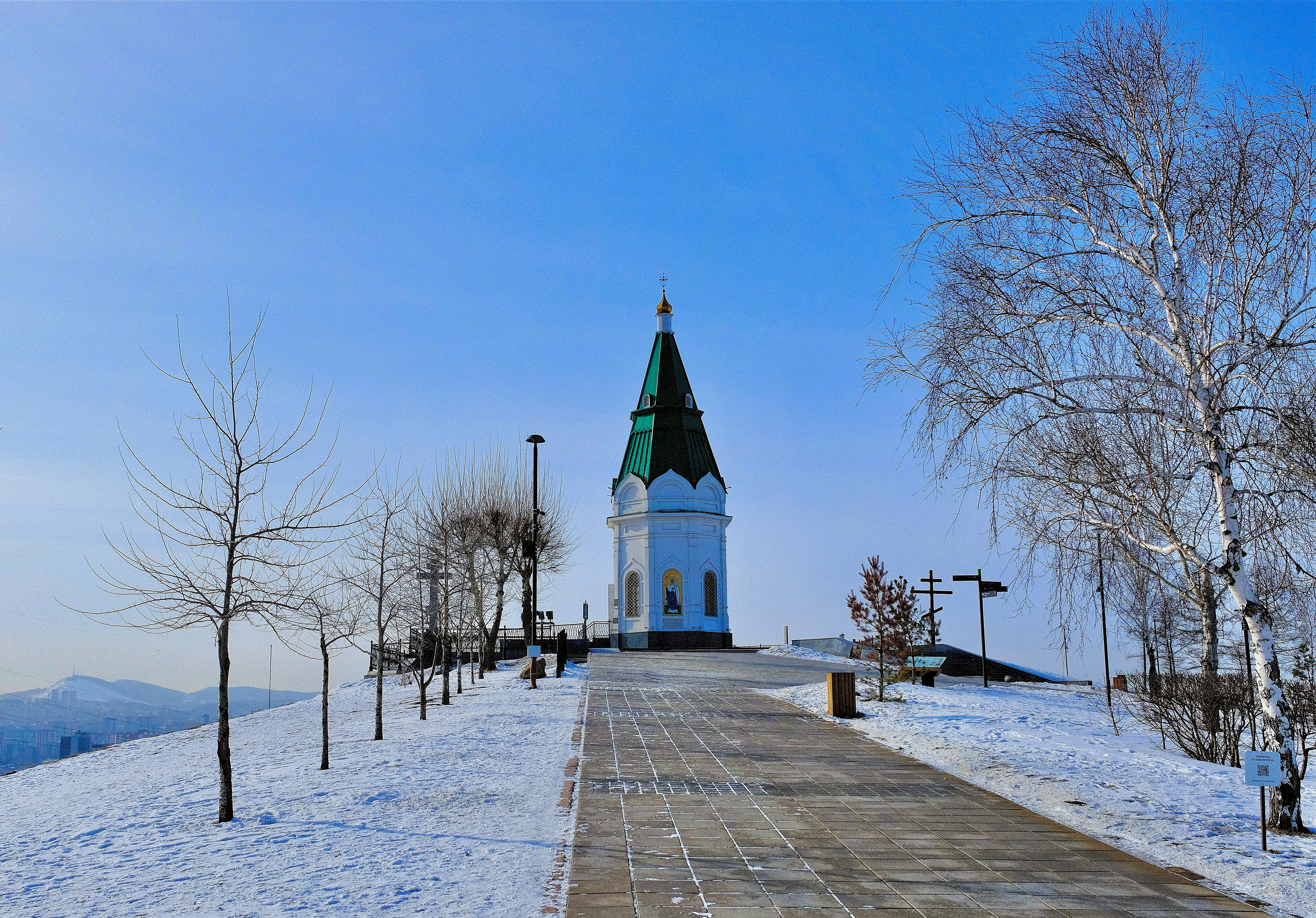 Часовня Параскевы Пятницы на Караульной горе в Красноярске